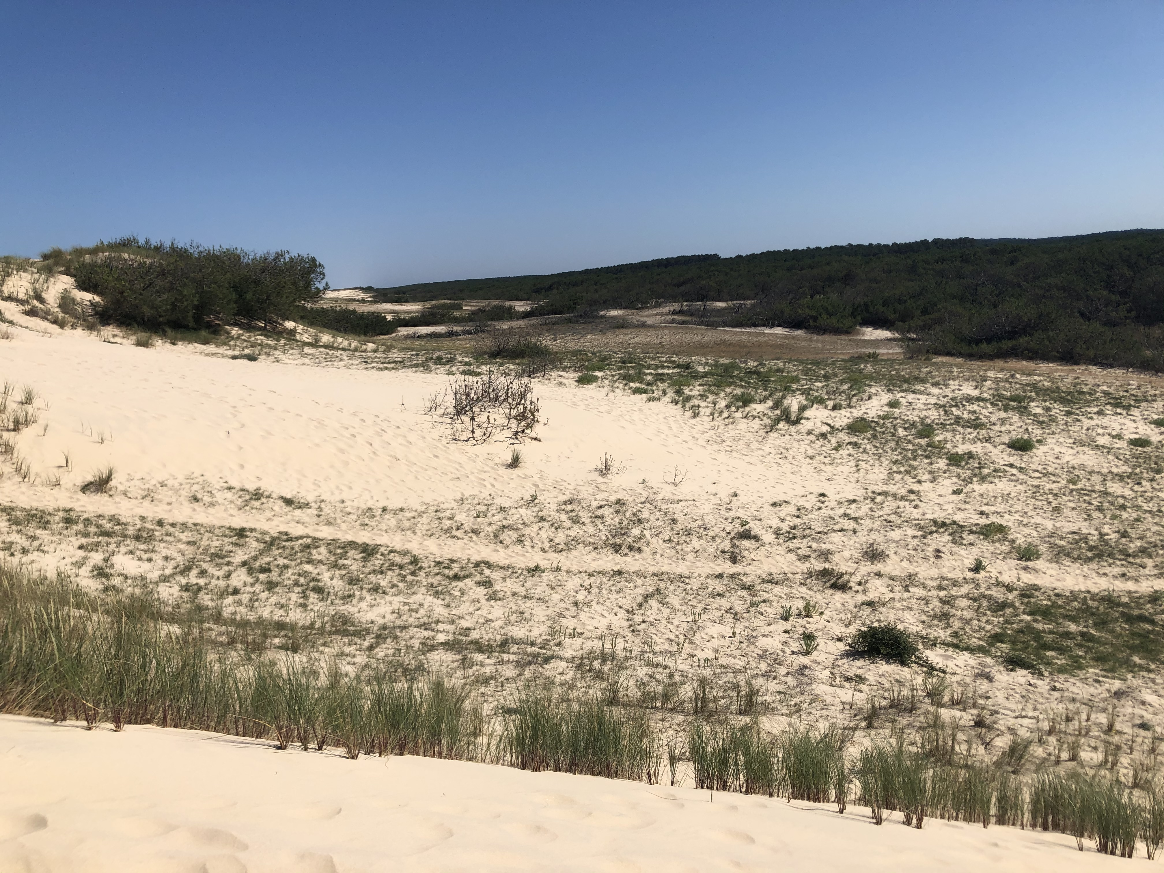 Crohot ou lède entre deux cordons dunaires